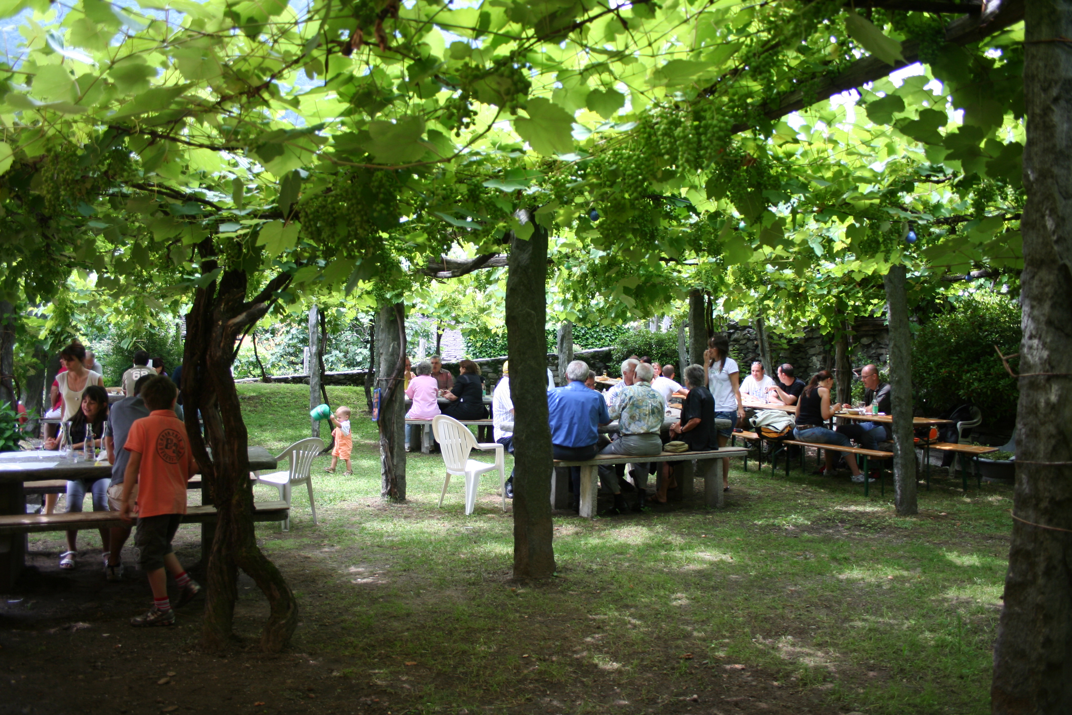 Pergola vignata presso l'Osteria dal Nito di Giumaglio; nucleo paese; patrimonio protetto dal comune di Maggia